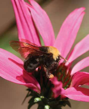 Bombus franklini